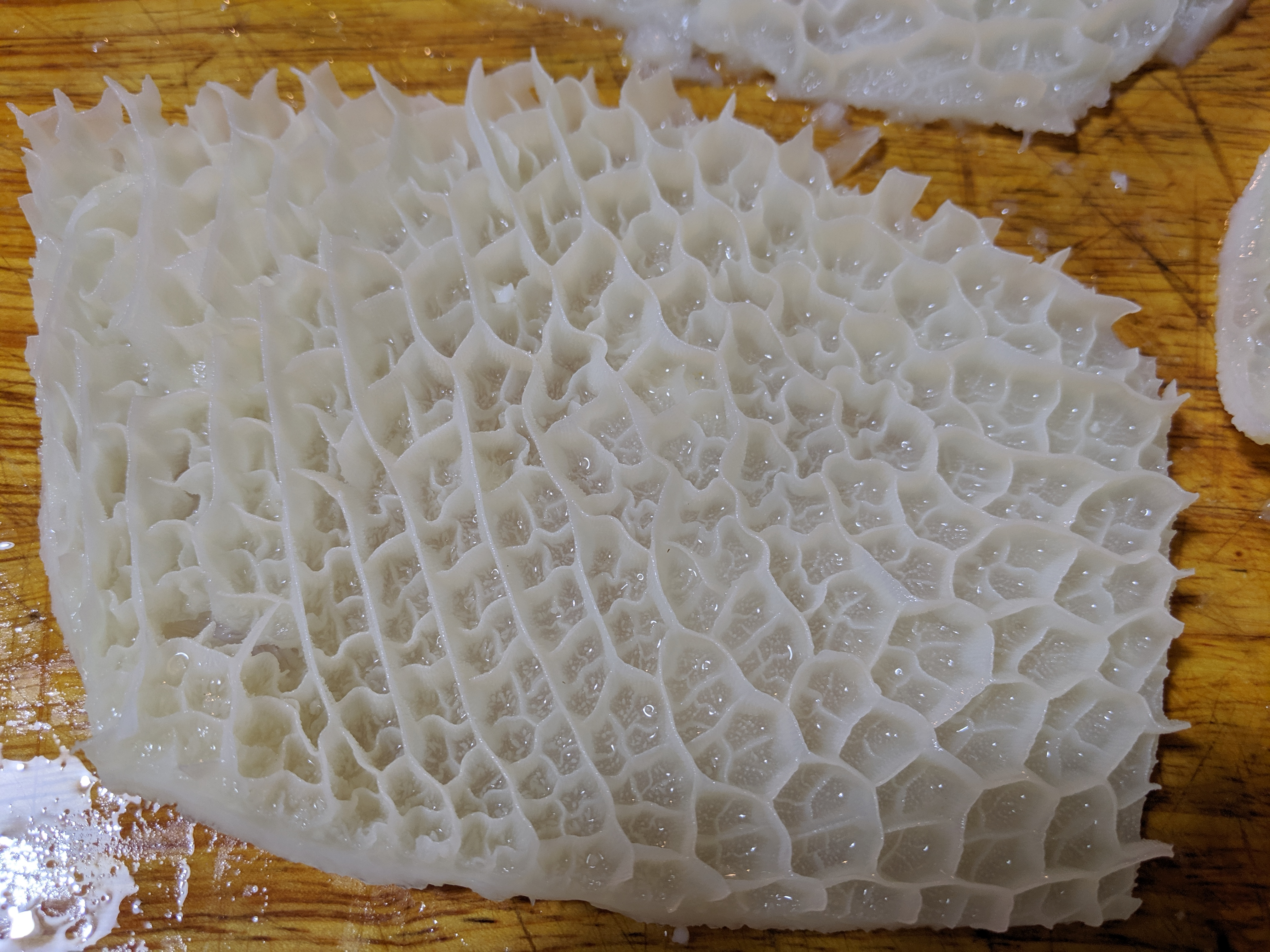 trippa